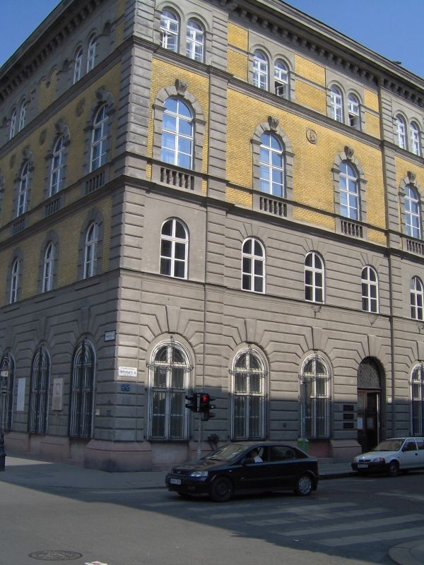 Régi zeneakadémia épülete, Budapest VI. (Andrássy út 67.), tervezte Láng Adolf